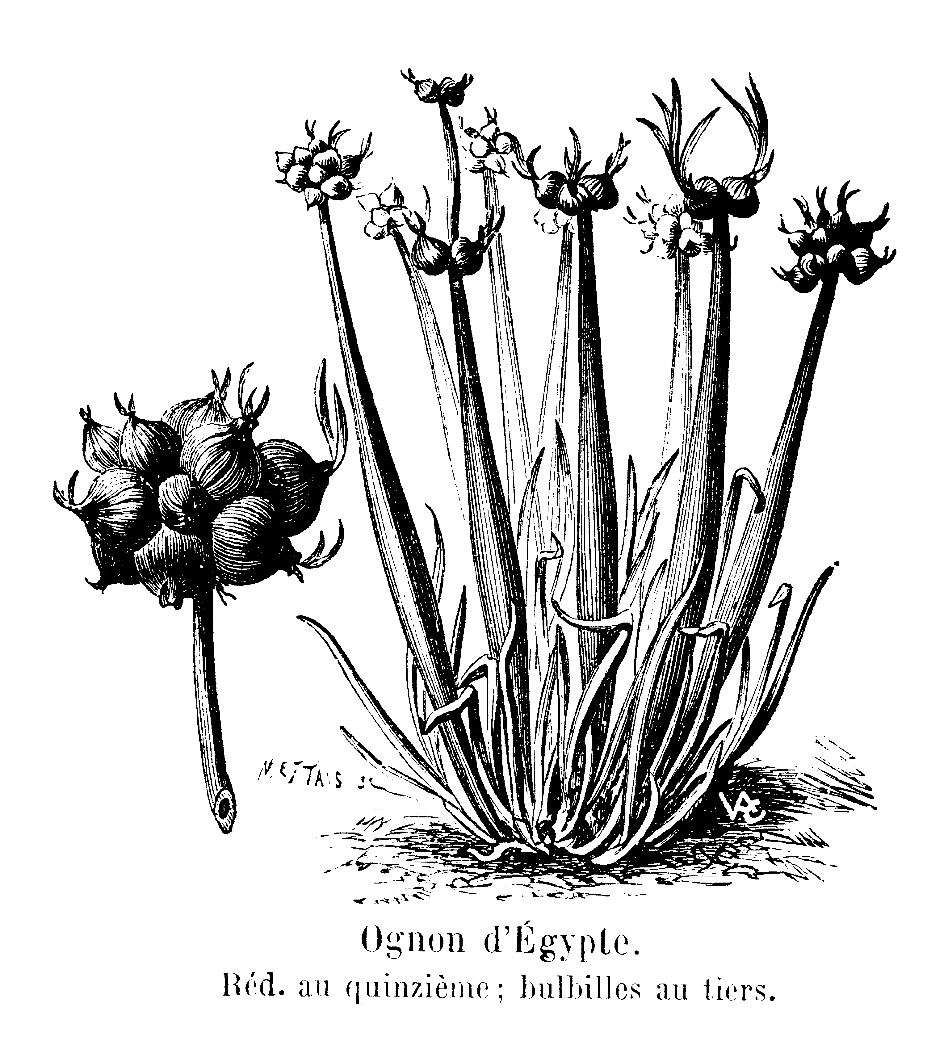 Egyptian onion